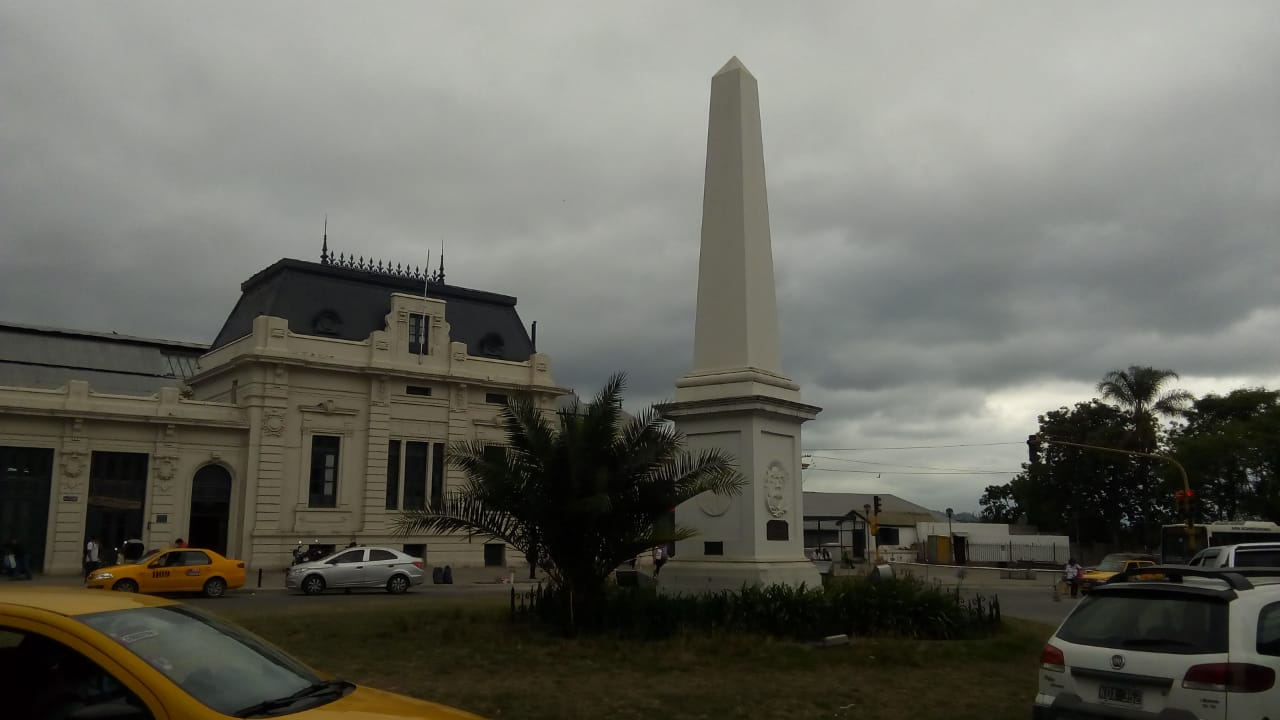 Este Obelisco fue creado, en conmemoración a la lucha del pueblo jujeño.